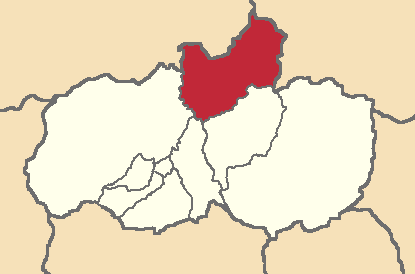 Mapa localizador del cantón en Tungurahua, Ecuador